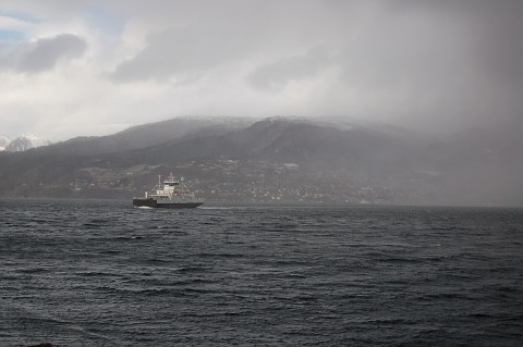 Volda